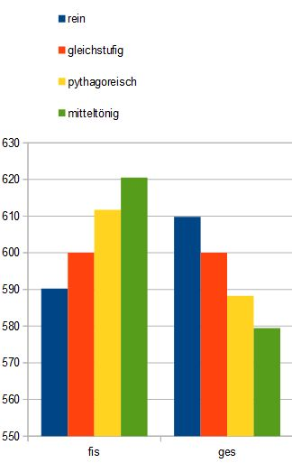 Fis (als Leitton zu G) intoniert bei der pythagoreischen Stimmung höher als Ges (als Leitton zu F). Bei der reinen oder mitteltönigen Stimmung ist umgekehrt Fis tiefer als Ges. Pythagoreische Stimmung G=702 Cent Diatonischer Halbton (90 Cent) tiefer Fis=612 Cent F=498 Cent Diatonischer Halbton (90 Cent) höher Ges=588 Cent Reine Stimmung G=702 Cent Diatonischer Halbton (112 Cent) tiefer Fis=590 Cent F=498 Cent Diatonischer Halbton (112 Cent) höher Ges=610 Cent 1/4-mitteltönige Stimmung G=697 Cent Diatonischer Halbton (117 Cent) tiefer Fis=579 Cent f=503 Cent Diatonischer Halbton (117 Cent) höher Ges=620 Cent